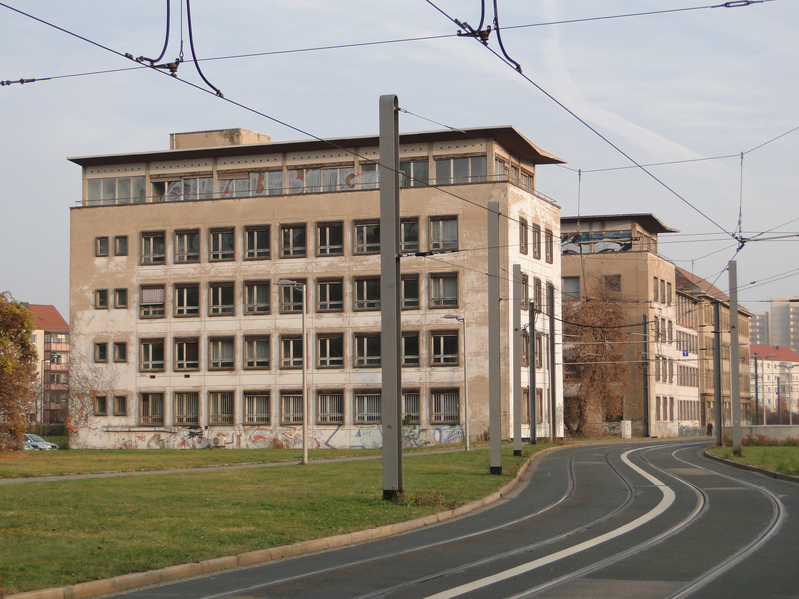 ehemalige Reichsbahndirektion in Dresden, umweit des Hauptbahnhofs